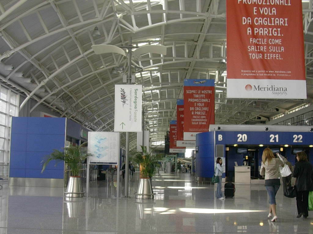 Aeroporto di Cagliari zona partenze. Foto personale.